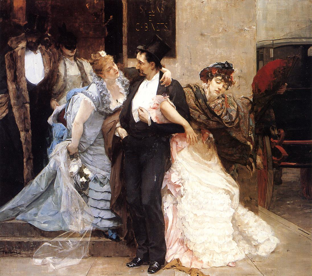 detail of a bigger painting.